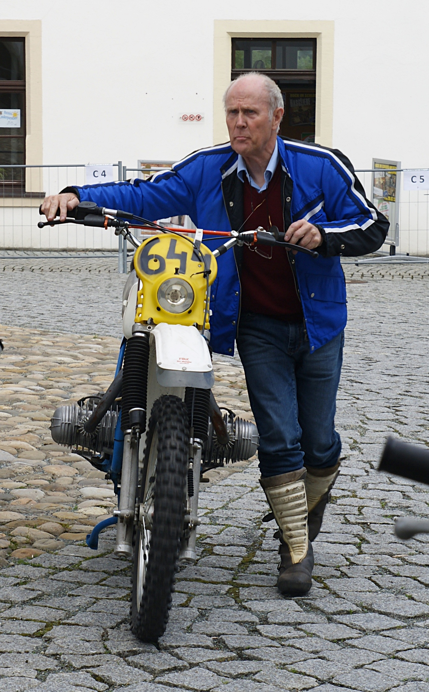 Rolf Witthöft bei der Classic Enduro Zschopau 2013